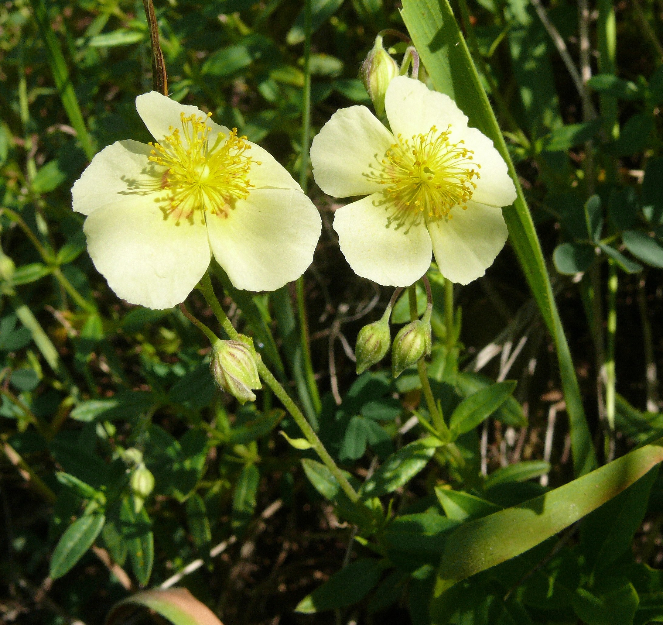 Helianthemum nummularium subsp. obscurum, oistalb, Deutschland